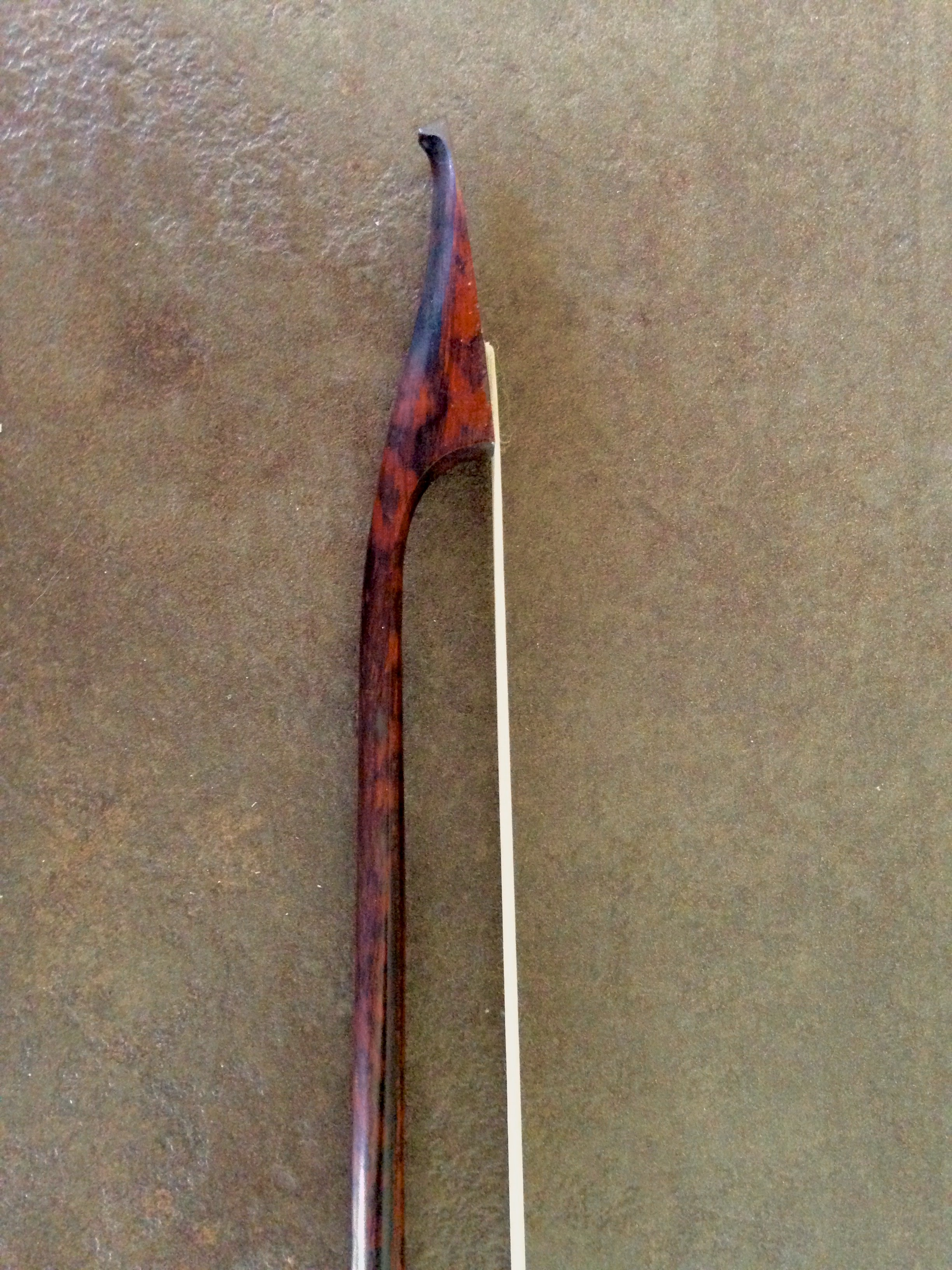 Baroque bow XVIII century made by Jean-Luc Tauziède, 2014 - Head